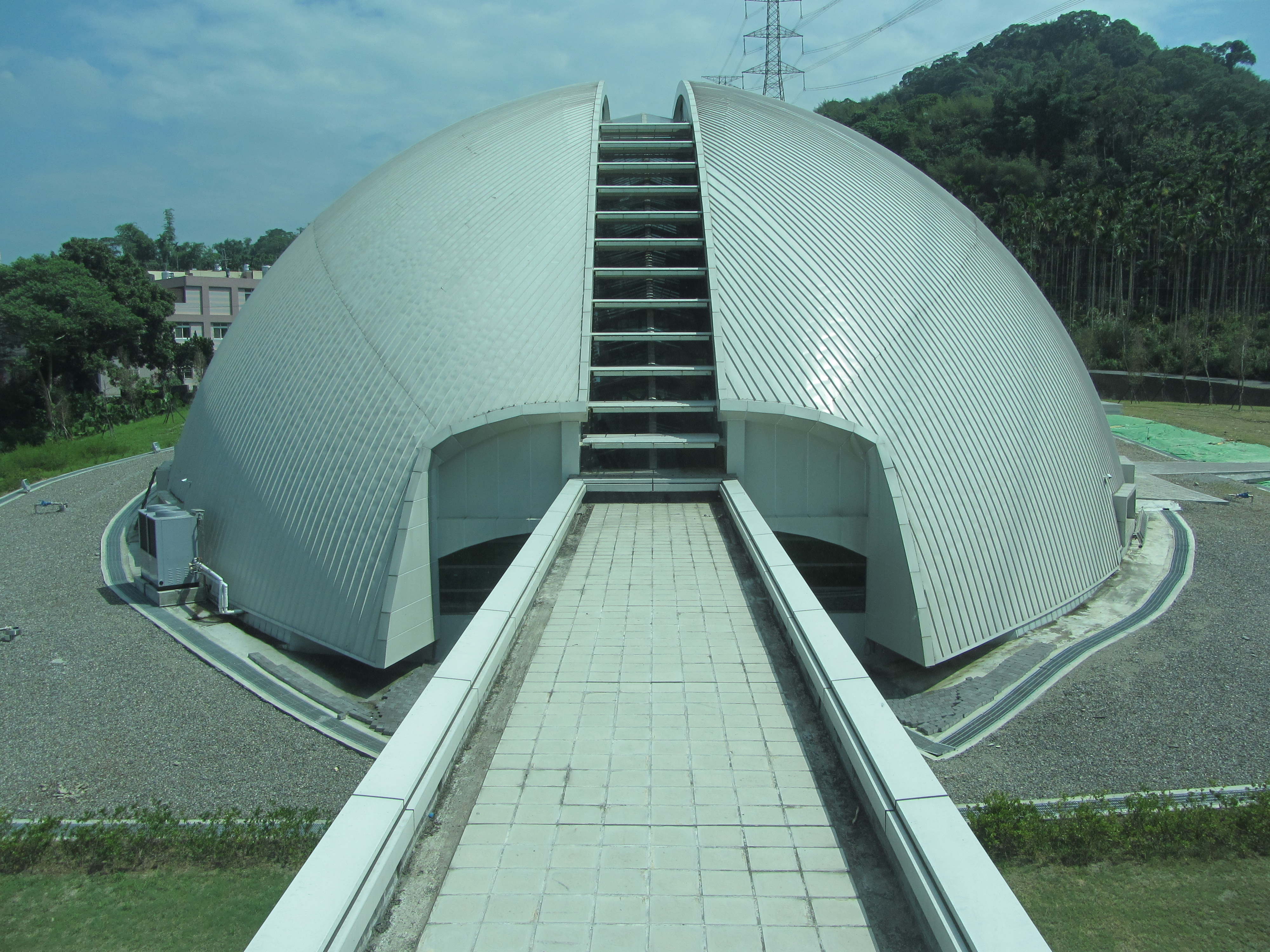 國立自然科學博物館車籠埔斷層保存園區車籠埔斷層槽溝保存館